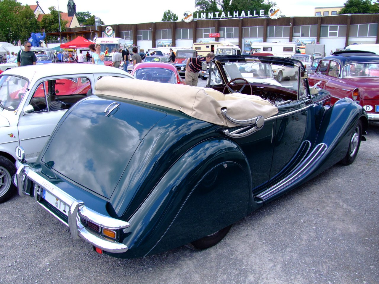 Jaguar MK5 DHC 1948 Jaguar Mk V (Drop Head Coupe) Baujahr: 1948, Bauzeit: 1948-52 125 PS 3,5 Liter 6 Zylinder Besonderheiten: Metrische Instrumente, Linkslenker In dieser Ausführung nur 200 Stück gebaut